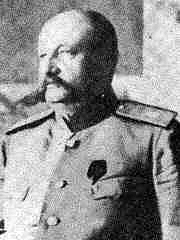 Nikolai Nikolaevich Yudenich, Russian general Николай Николаевич Юденич